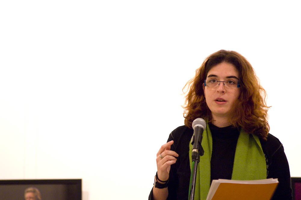 Còdols, la Biennal de poesia Catalana : Dimecres 24 d’octubre de 2007, “Poetes joves amb premis grans”. Còdols reuneix Núria Martínez-Vernis, Jordi Valls i Àngels Gregori en un recital presentat per Víctor Sunyol. Al Museu d’Art de Cerdanyola Can Domènech, a Cerdanyola del Vallès, a les 8 del vespre.